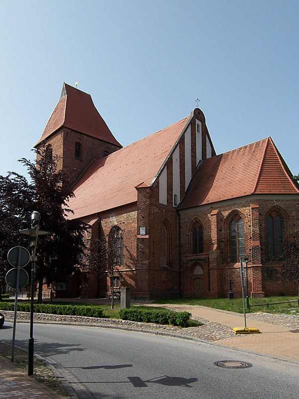 Kirche in Crivitz, Landkreis Parchim